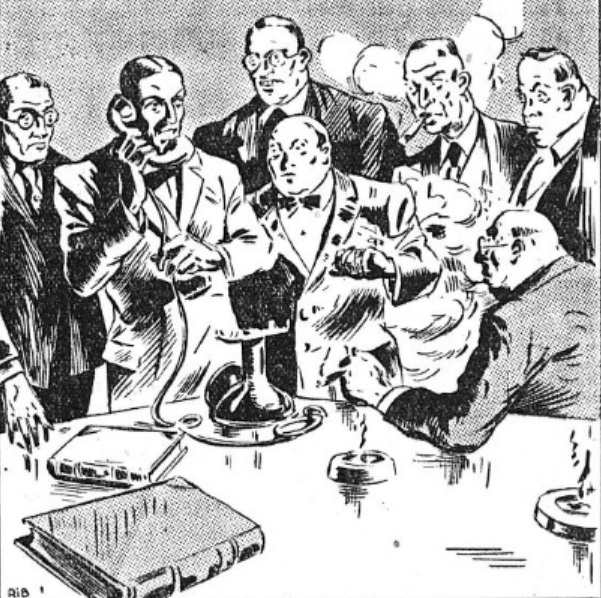 Illustration accompagnant le roman-feuilleton Les Drames de Paris de Jean de La Hire publié dans les pages du Matin du 29/01/1941